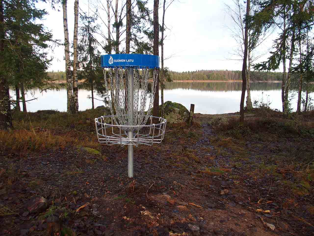 Frisbeegolfrata Haunisten altaan rannalla